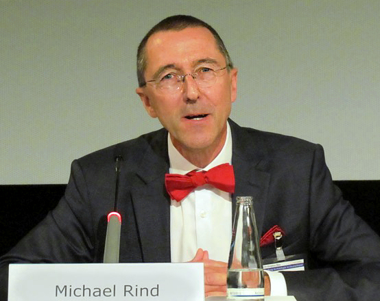 Michael Rind, Pressekonferenz zur Ausstellung "Bewegte Zeiten. Archäologie in Deutschland" in Berlin